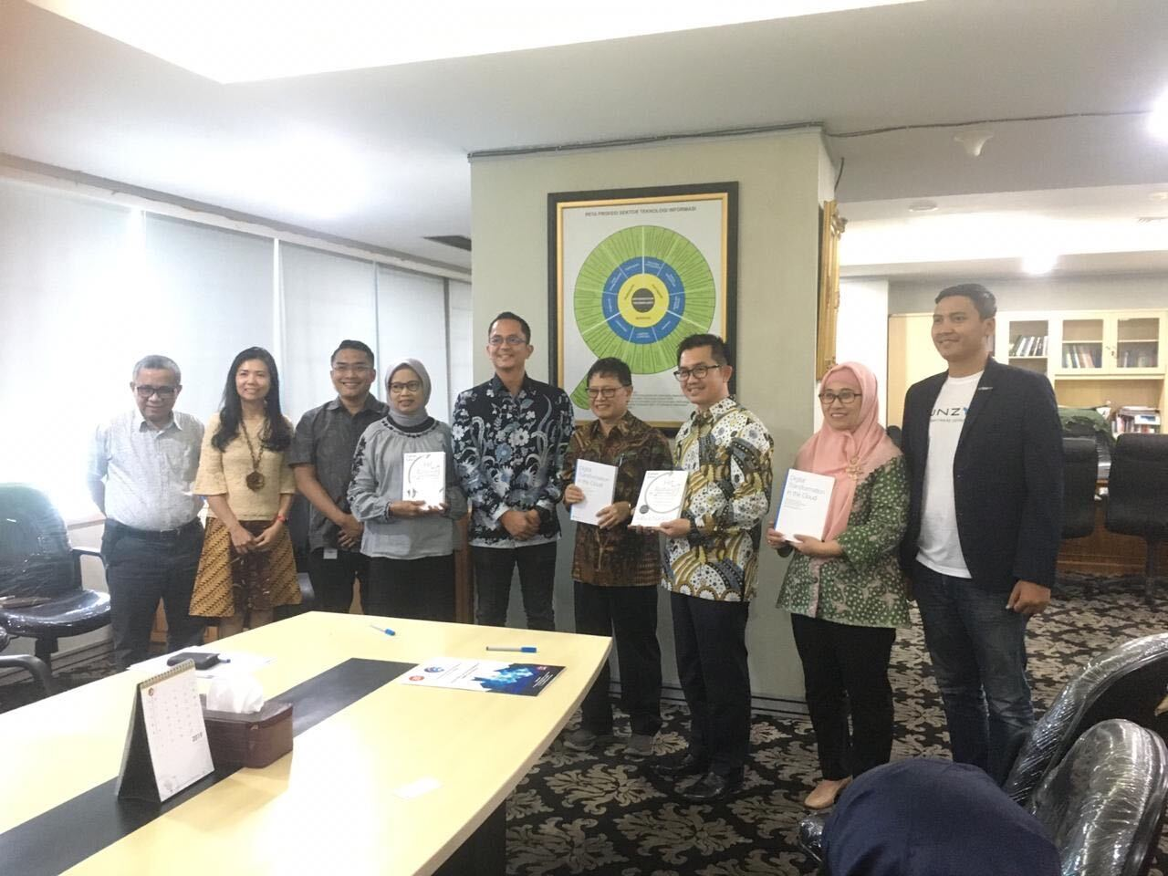 Microsoft dan Kementerian Komunikasi dan Informatika Republik Indonesia menandatangani Nota Kesepahaman Digital Talent Scholarship.